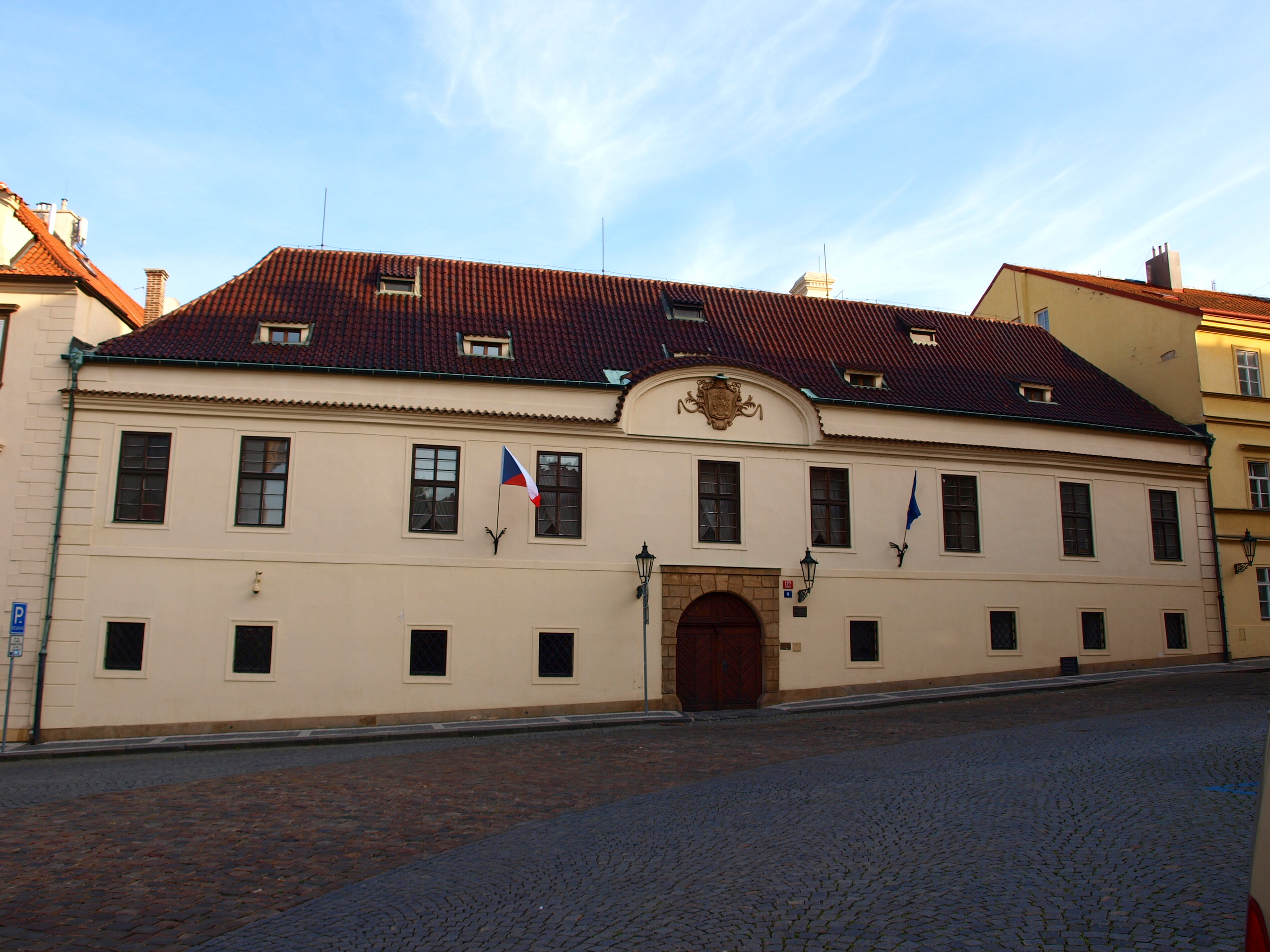 Hrzánský palác